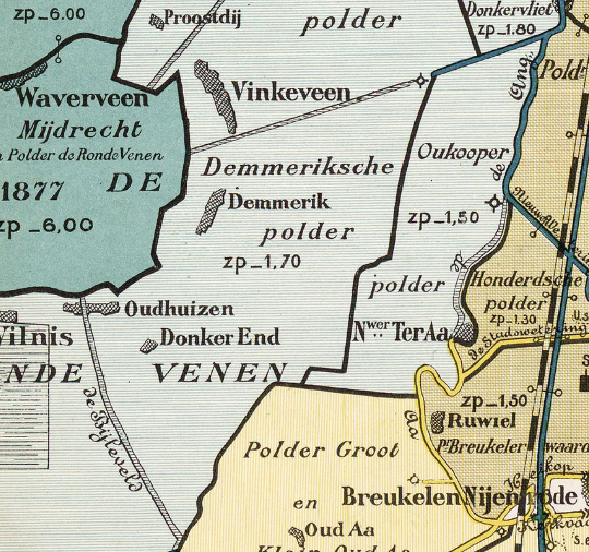 Demmerik